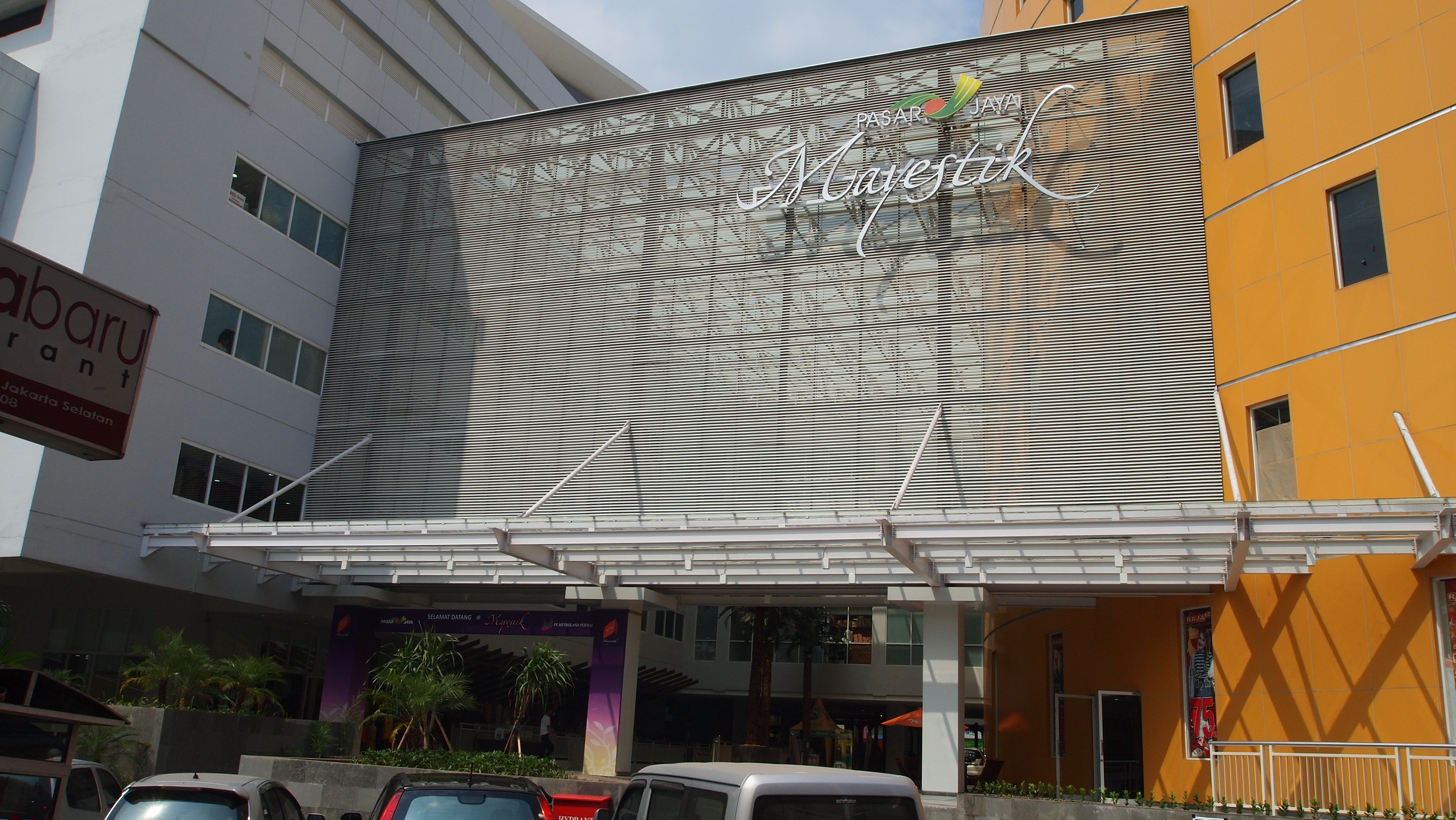 Pintu Barat Pasar Mayestik